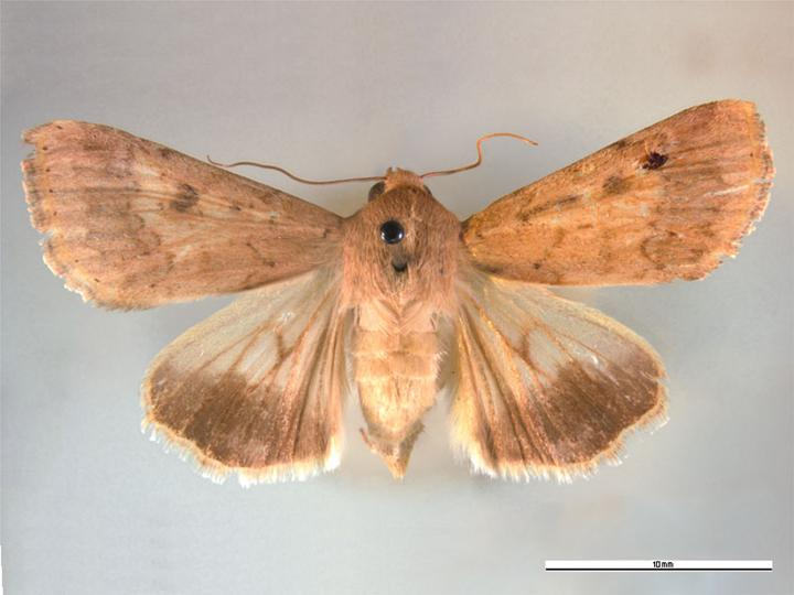 Helicoverpa armigera dorsal view